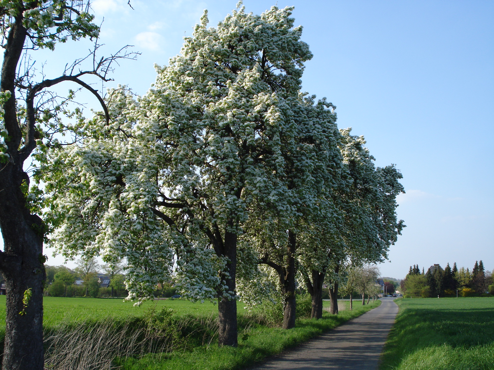 4 blühende Bäume der Birnensorte Prinzessin Marianne